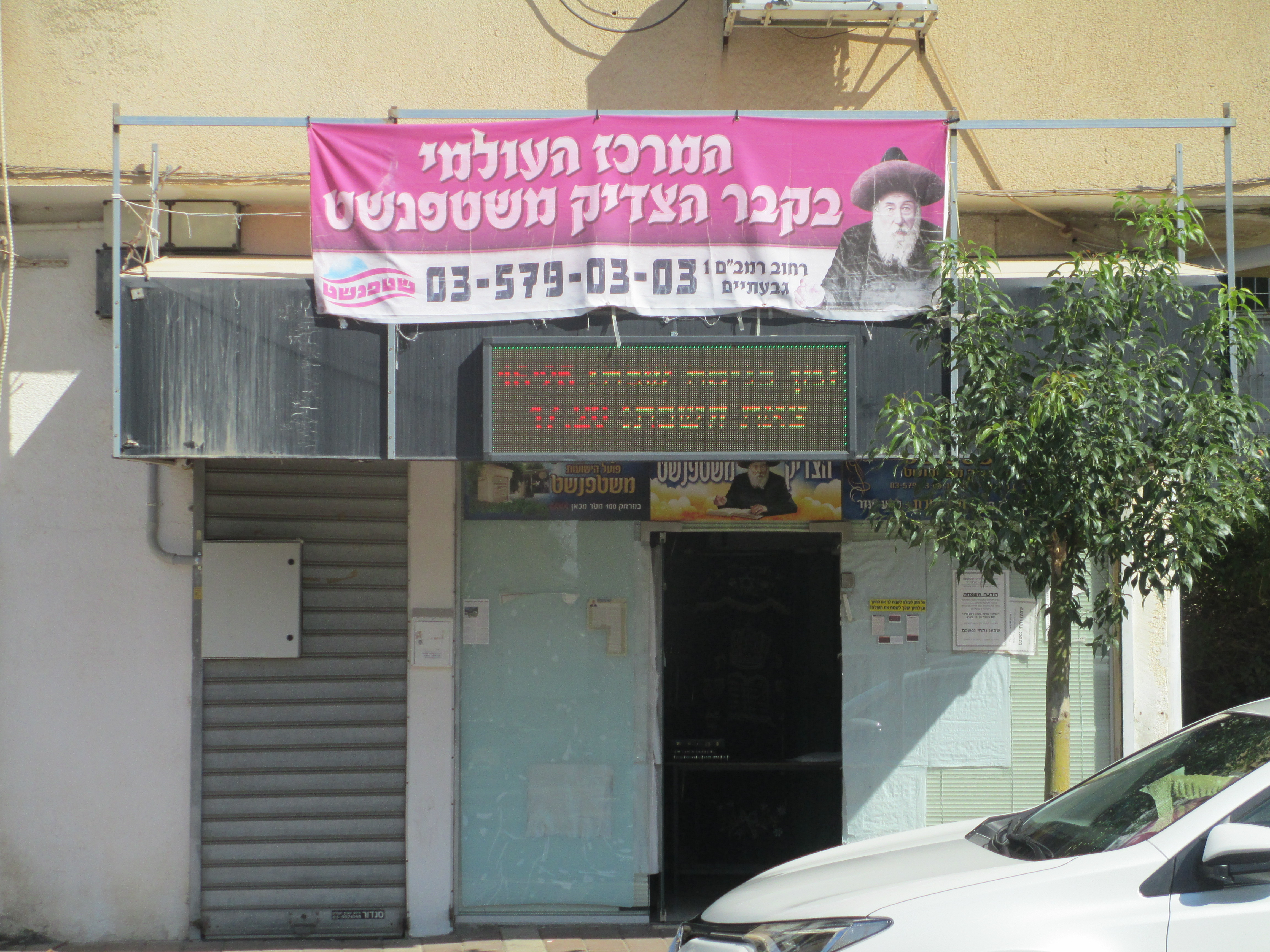 מרכז שטפנשט בגבעתיים